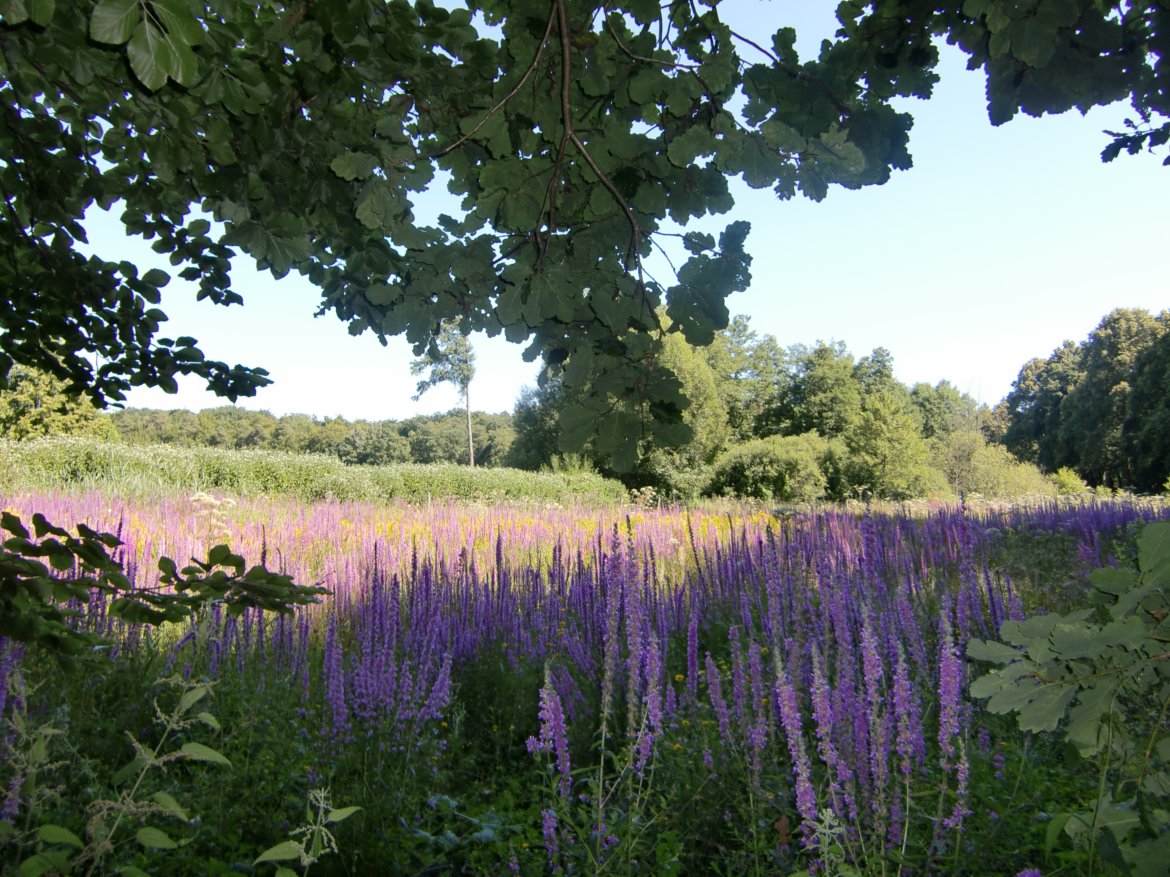 Blühende Feuchtwiese in Warenthin am/in der Nähe vom Rheinsberger See, Juli 2013. Warenthin ist Stadtteil von Rheinsberg und gehört zum Naturpark Stechlin-Ruppiner Land.